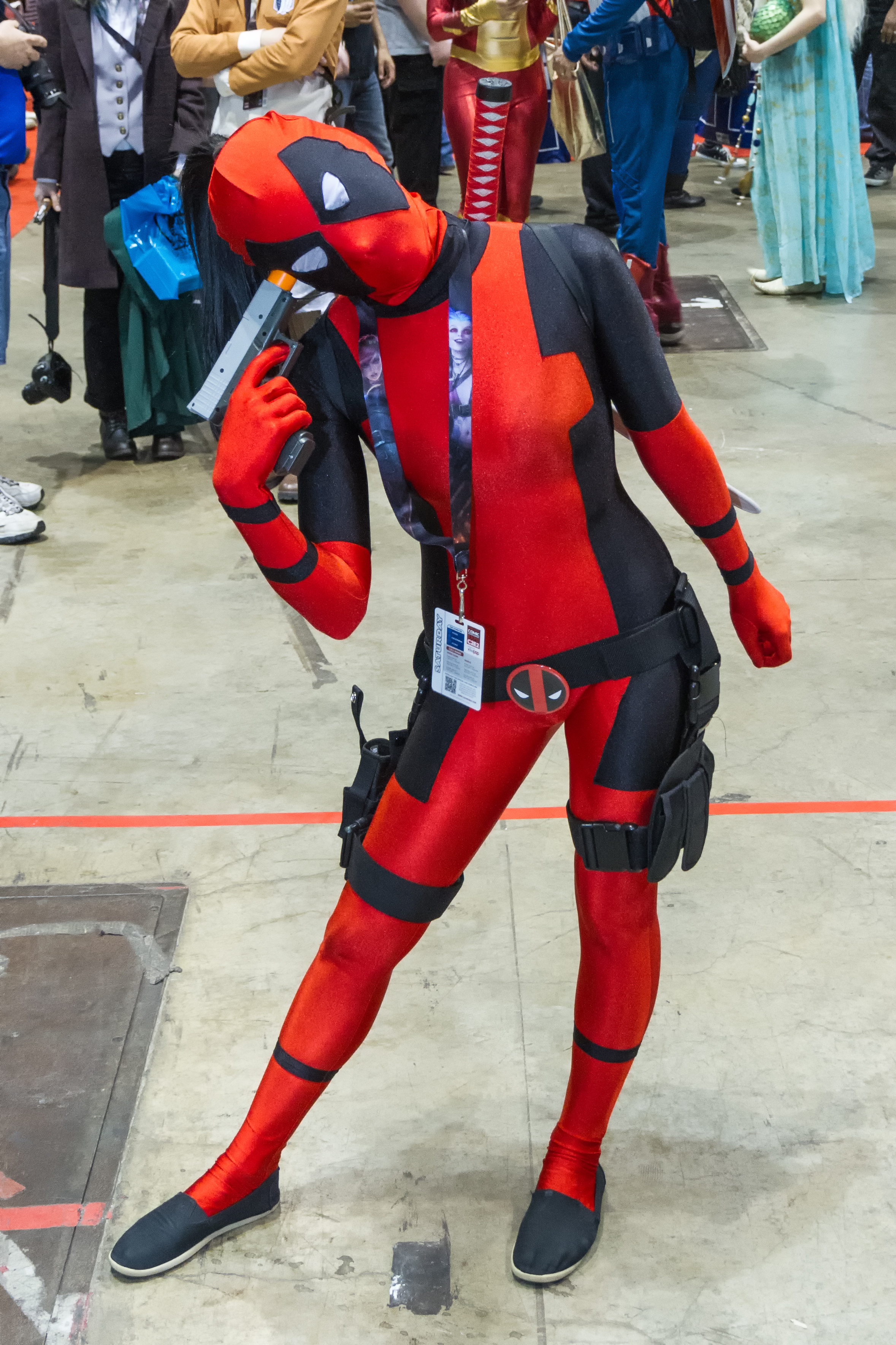 Deadpools sister